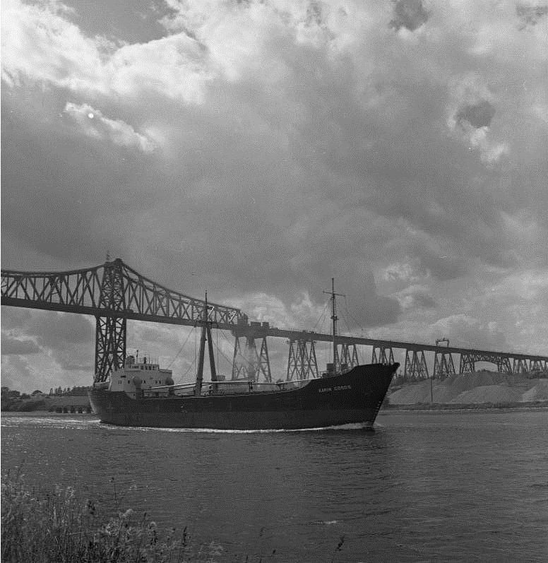 Rendsburg, Eisenbahnbrücke